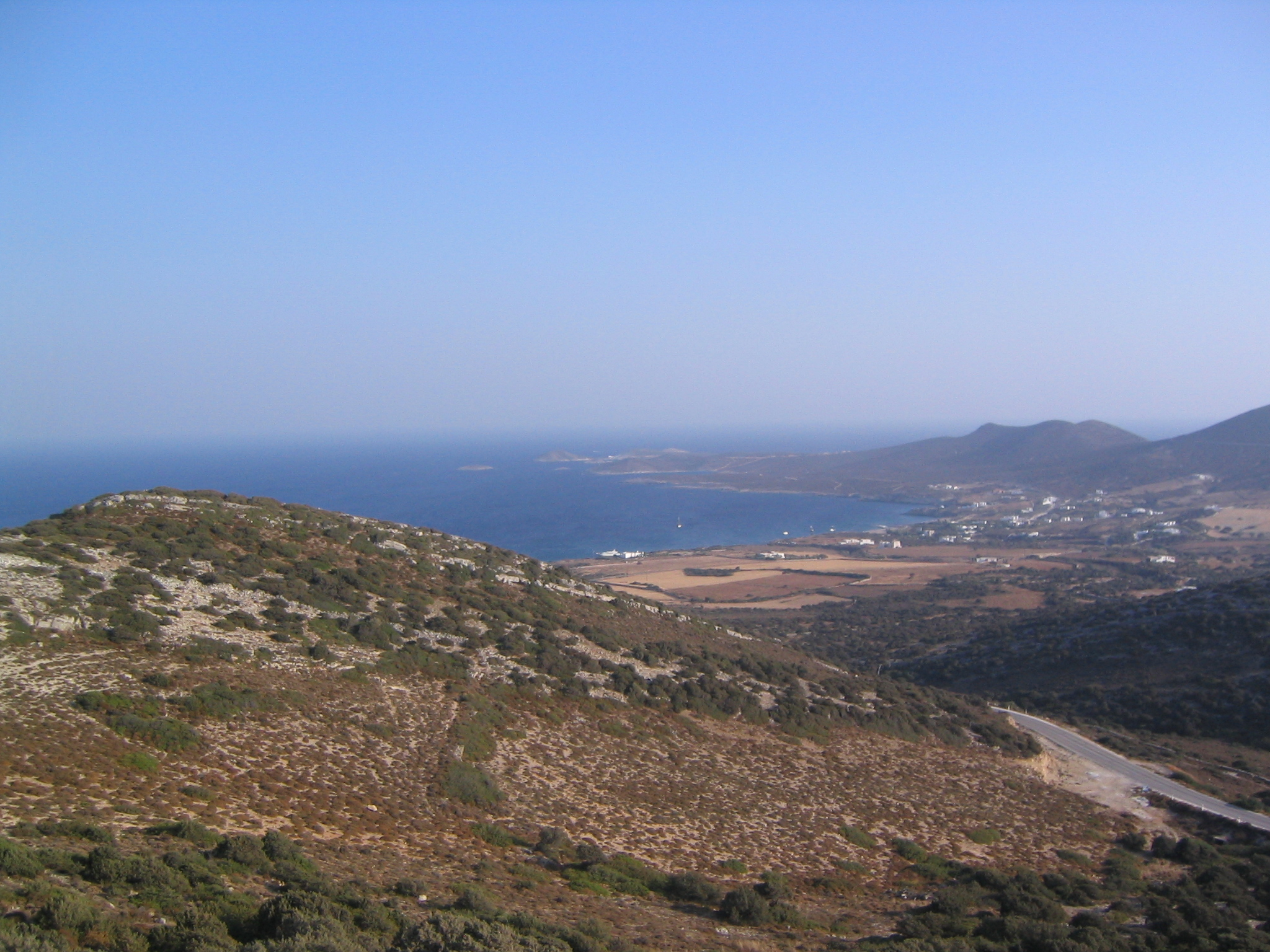 Foto gemaakt door J. van Esch. Voor overname van deze foto svp contact opnemen met chr.van.esch at